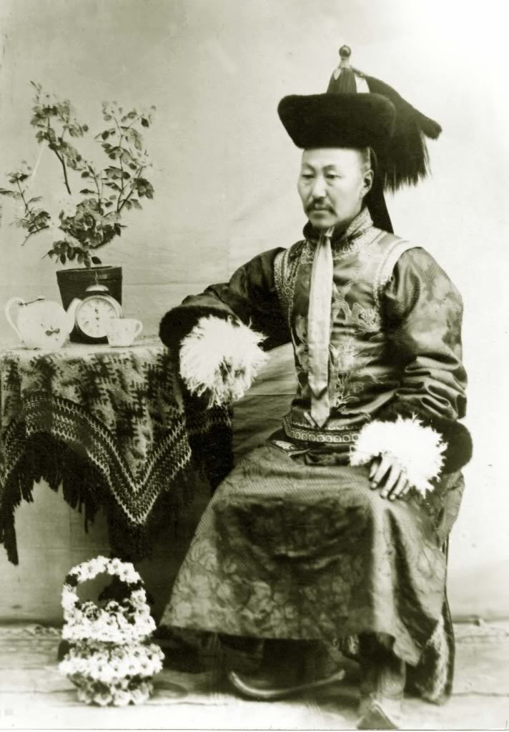 蒙古族起义领袖陶克陶胡，其人逝世超过五十年，故处于公有领域